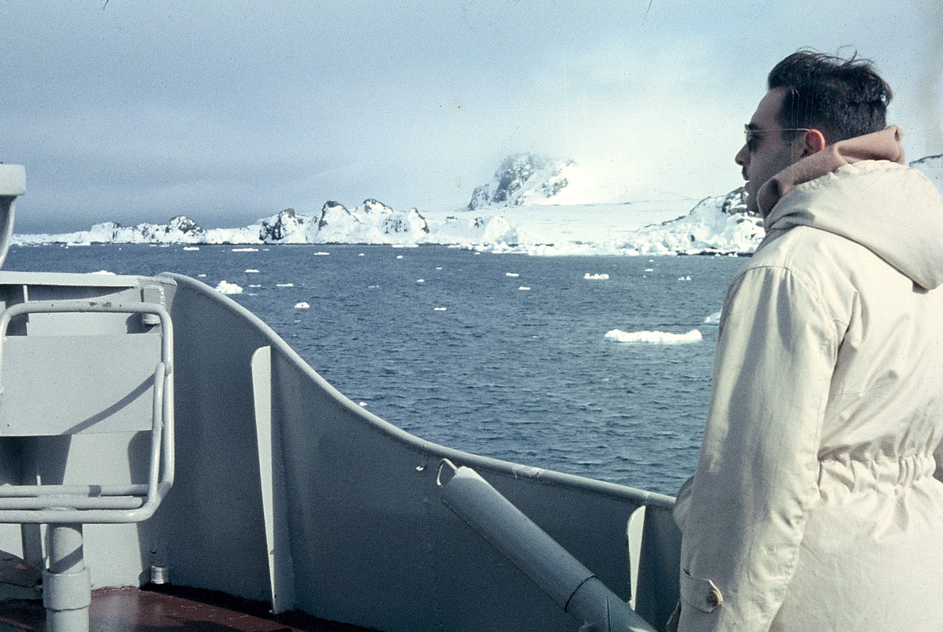 Navegando el canal Neumayer en demanda de Puerto Lockroy. Este lugar, sin dudas, es uno de los más bellos de la Antártica.